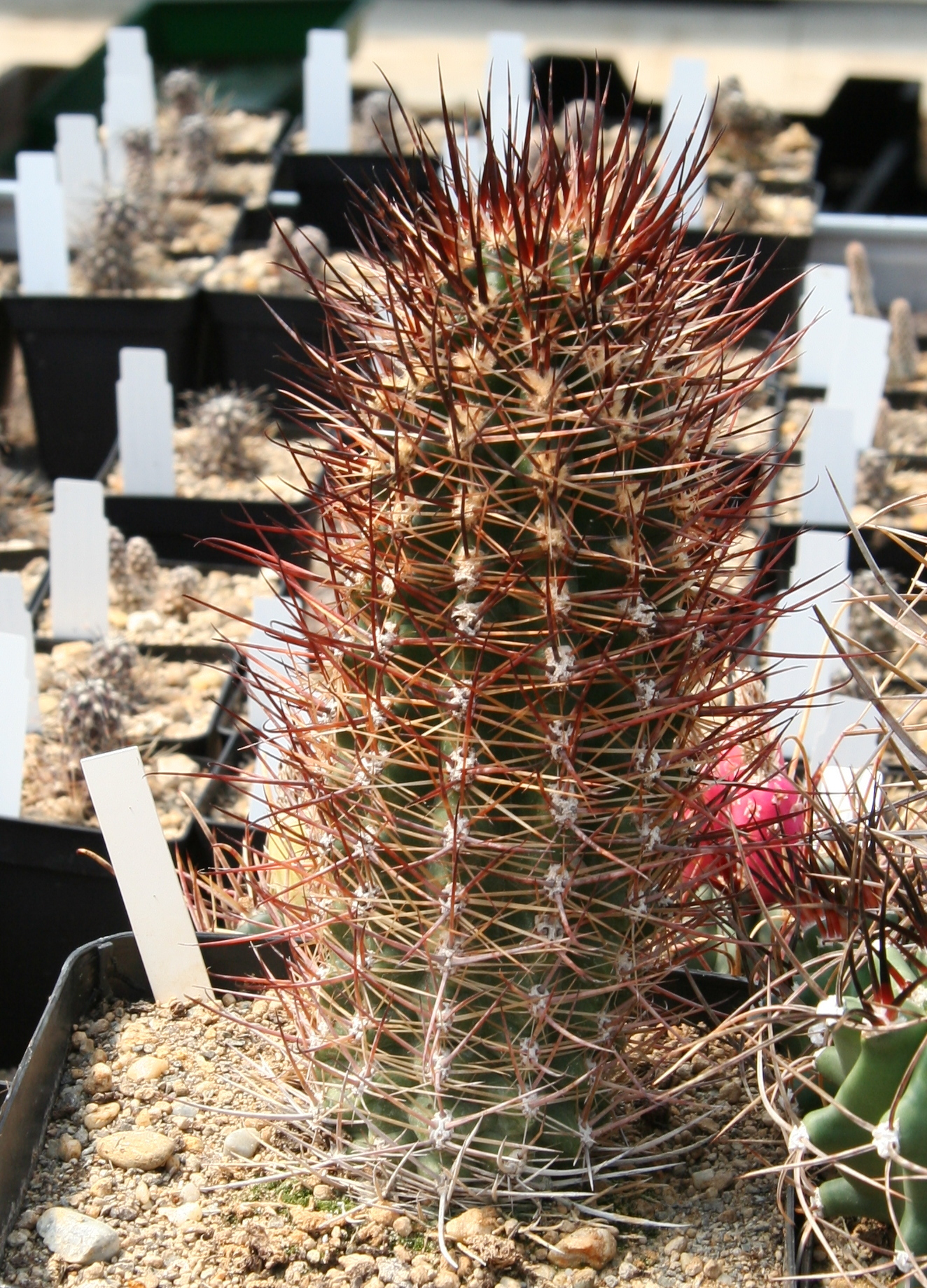 Austrocactus spec.